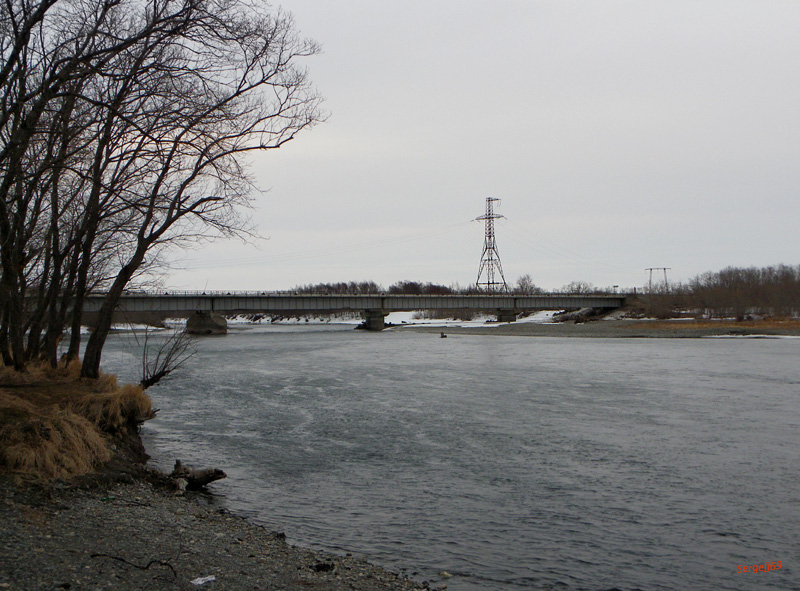 Most przez rzekę Bystraja w okolicach przysiółka Kawalerskoje